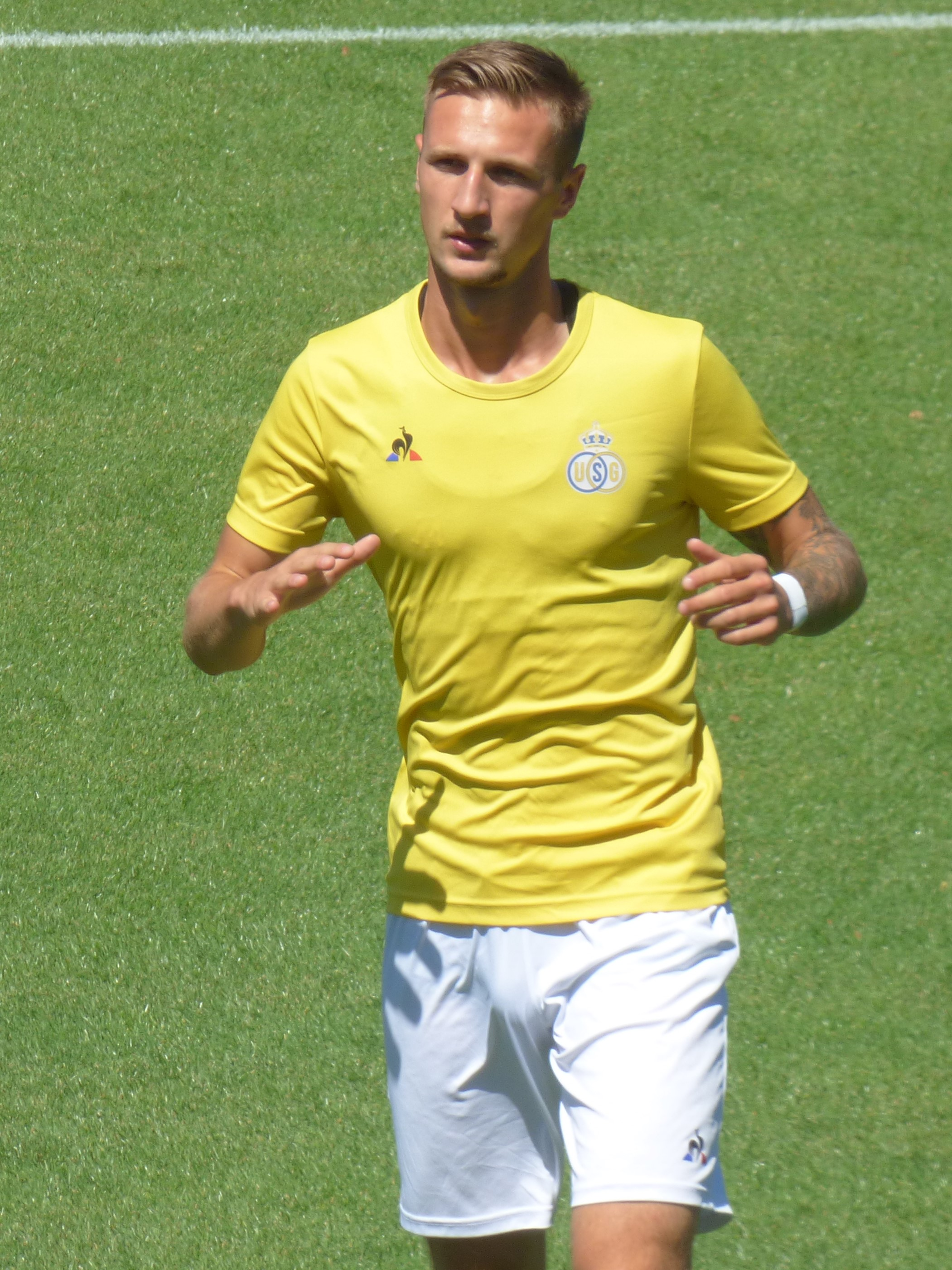 Siebe Van Der Heyden lors du match amical RC Lens / Union Saint-Gilloise, le 5 août 2020, au Stade Paul-Guerre de Billy-Montigny.